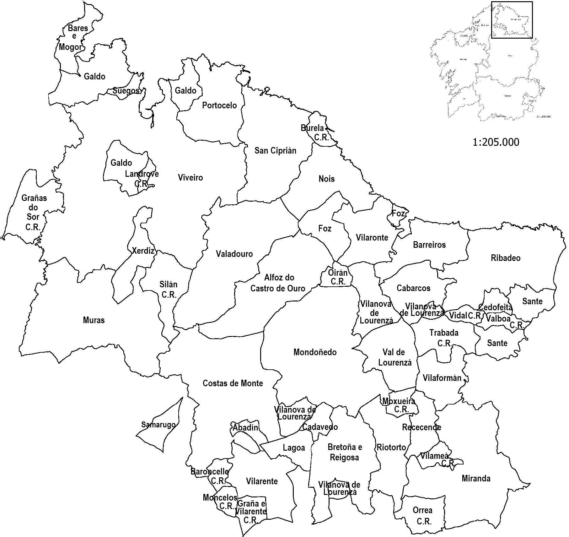 Xurisdicións da provincia de Mondoñedo.